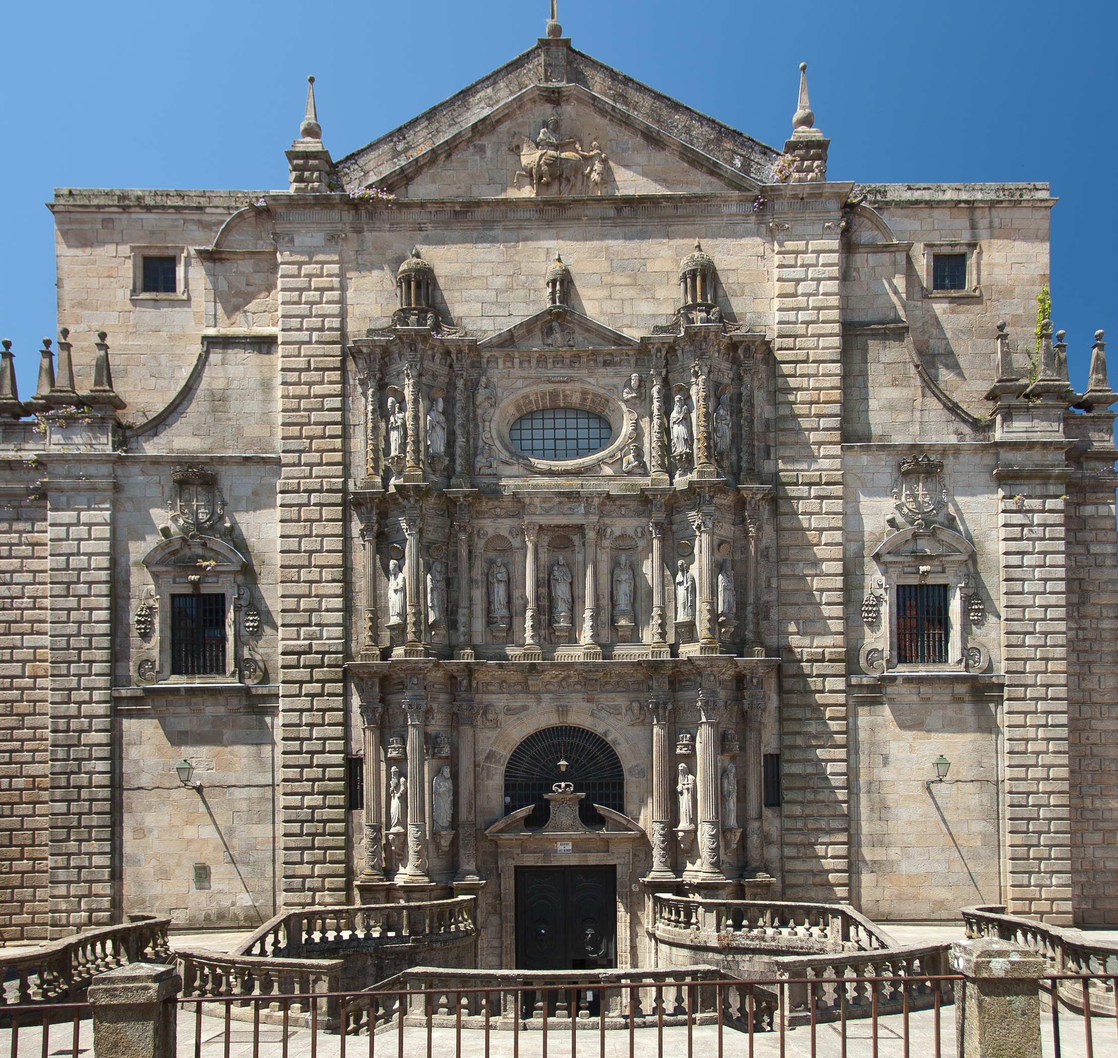 Mosteiro de San Martiño Pinario. Santiago de Compostela, Galicia (Spain)